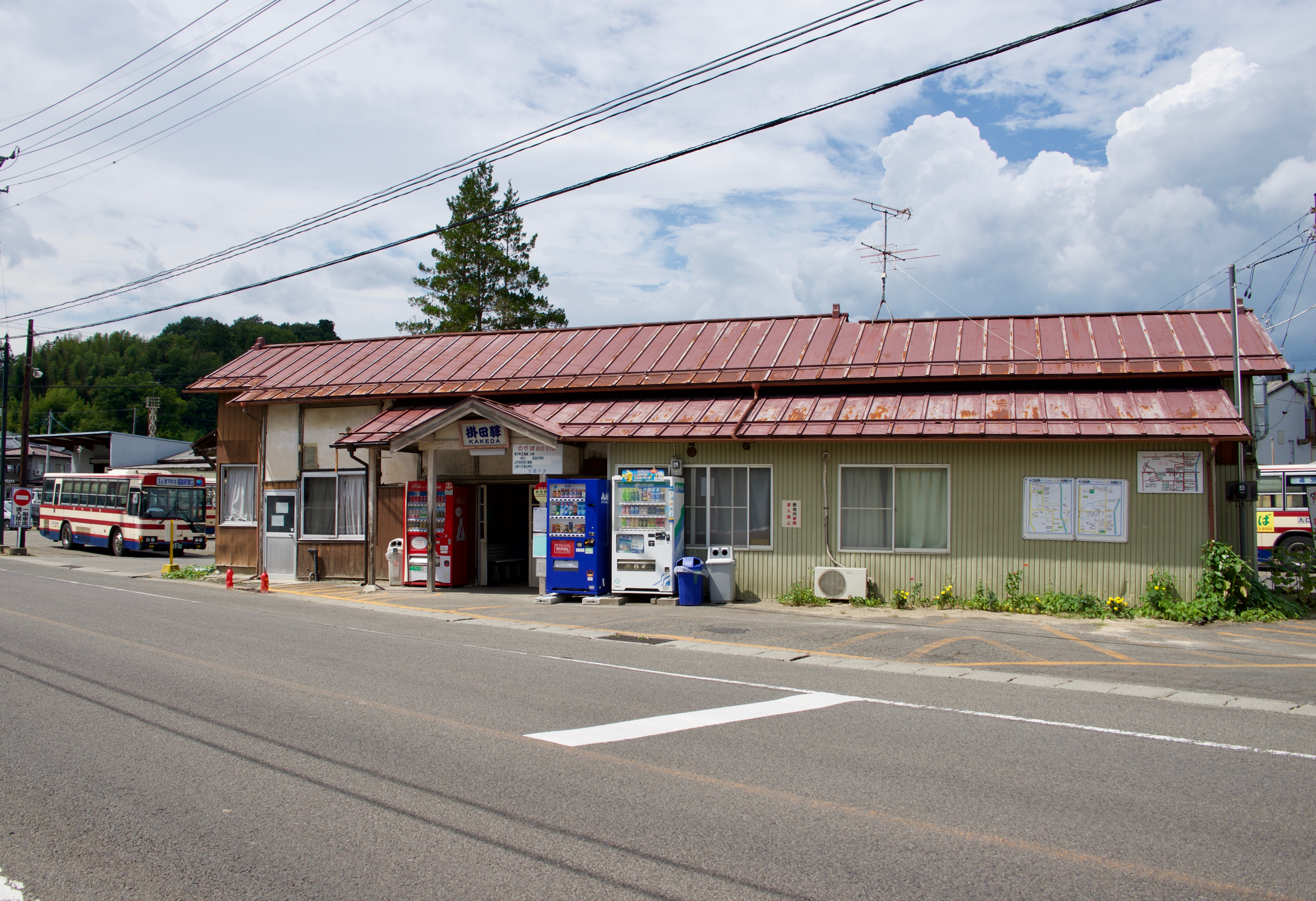 福島交通掛田駅前バス停